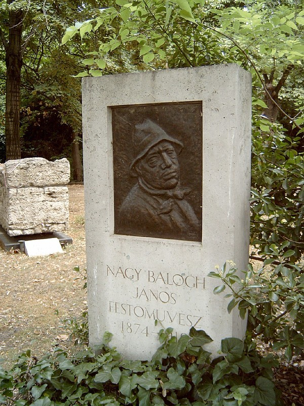 Nagy Balogh János sírja Budapesten. Borsos Miklós (1906–1990) szobrászművész alkotűsa (1961). Kerepesi temető: 34/2-1-11.